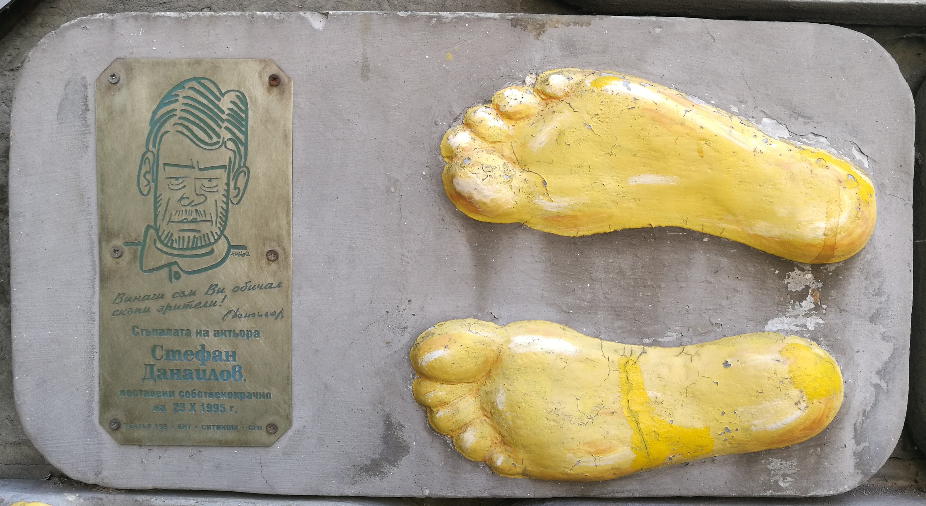 Стената на славата пред Театър 199 - пано с отпечатъци, послание и шарж на Стефан Данаилов.